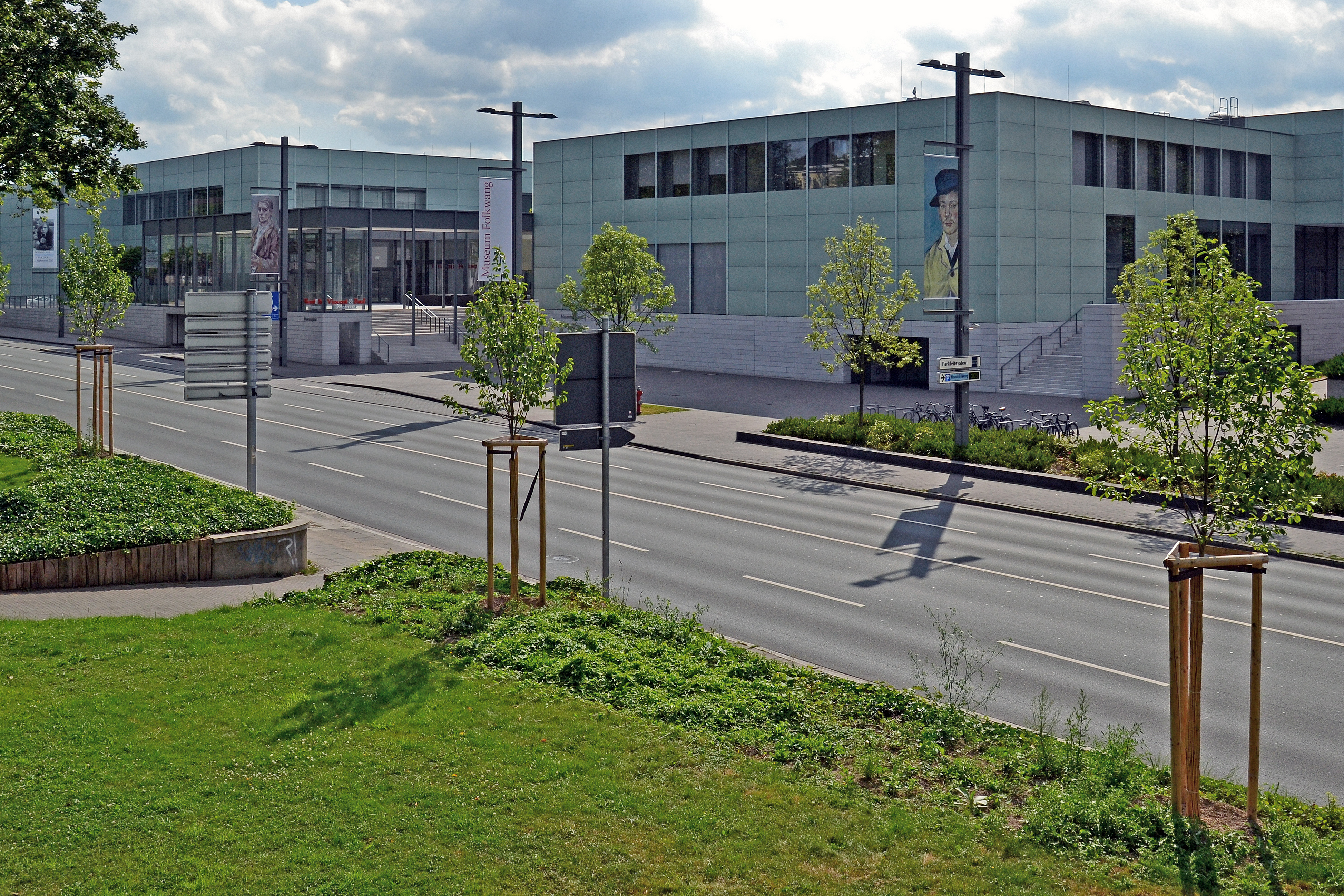 Museum Folkwang in Essen - Chipperfield